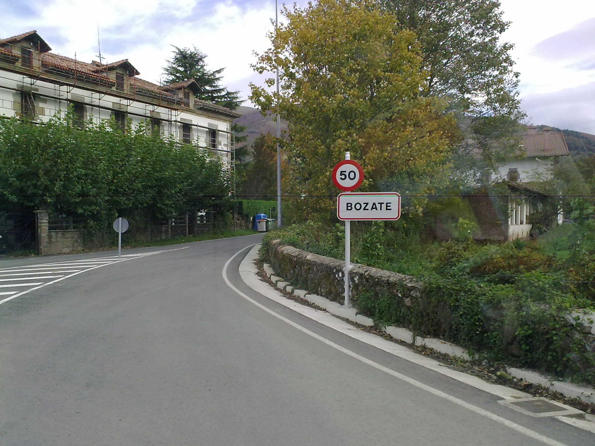 Bozate